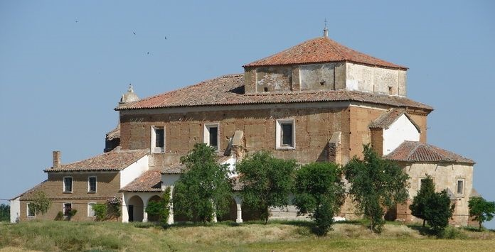 Ermita de la Virgen del Río, Villalcazar de Sirga